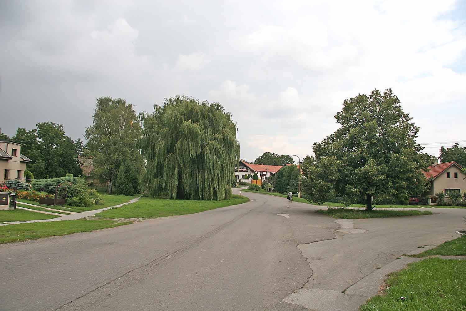 Mžany, village in Hradec Králové district, Czech Republic Autor:Prazak Date: 26. 8. 2006